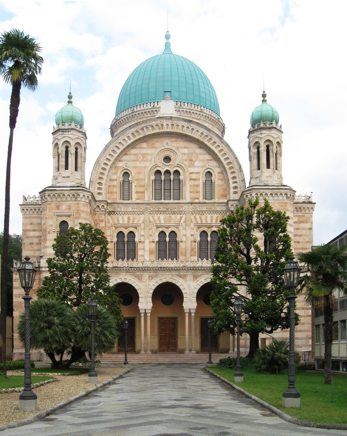 בית הכנסת של פירנצה 2009 רישיון נוצר על ידי משתמש:Daniel Ventura